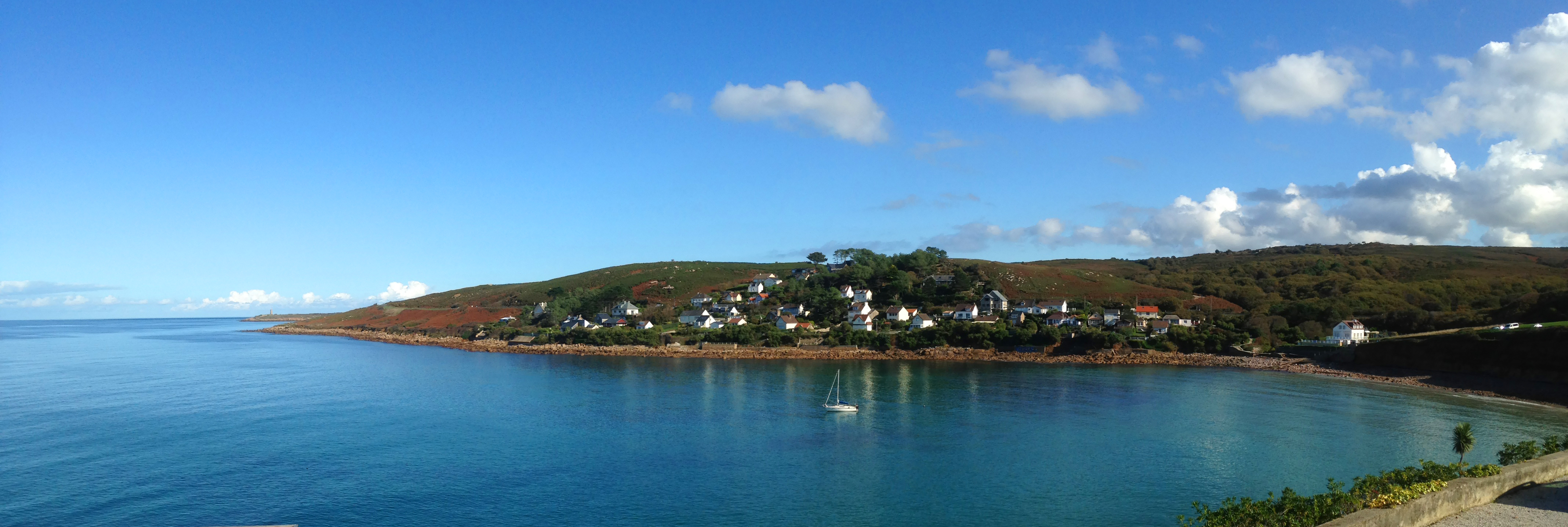 Anse du Brick à Maupertus, Cotentin